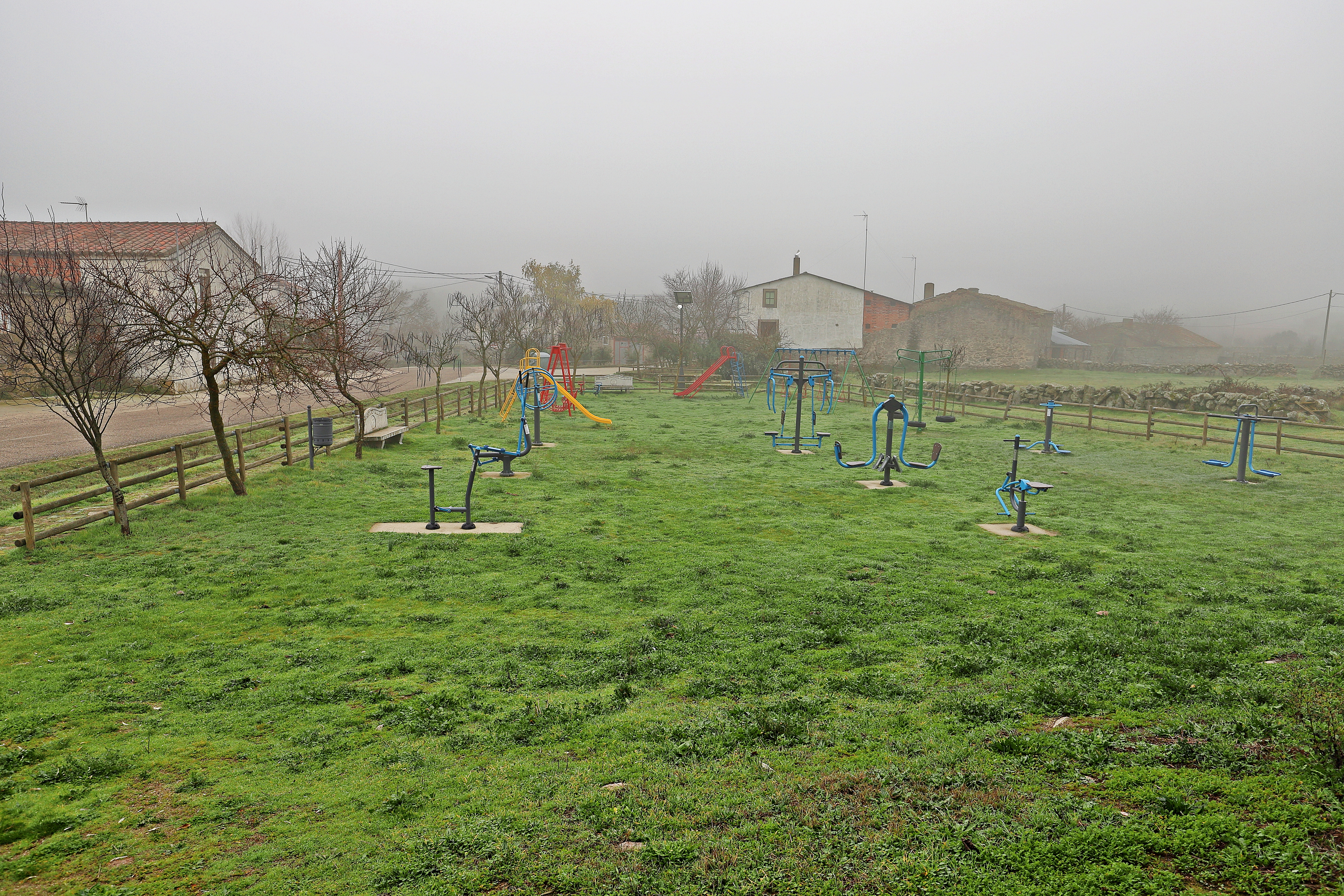 Moralina, municipio de la comarca de Sayago, en la provincia de Zamora